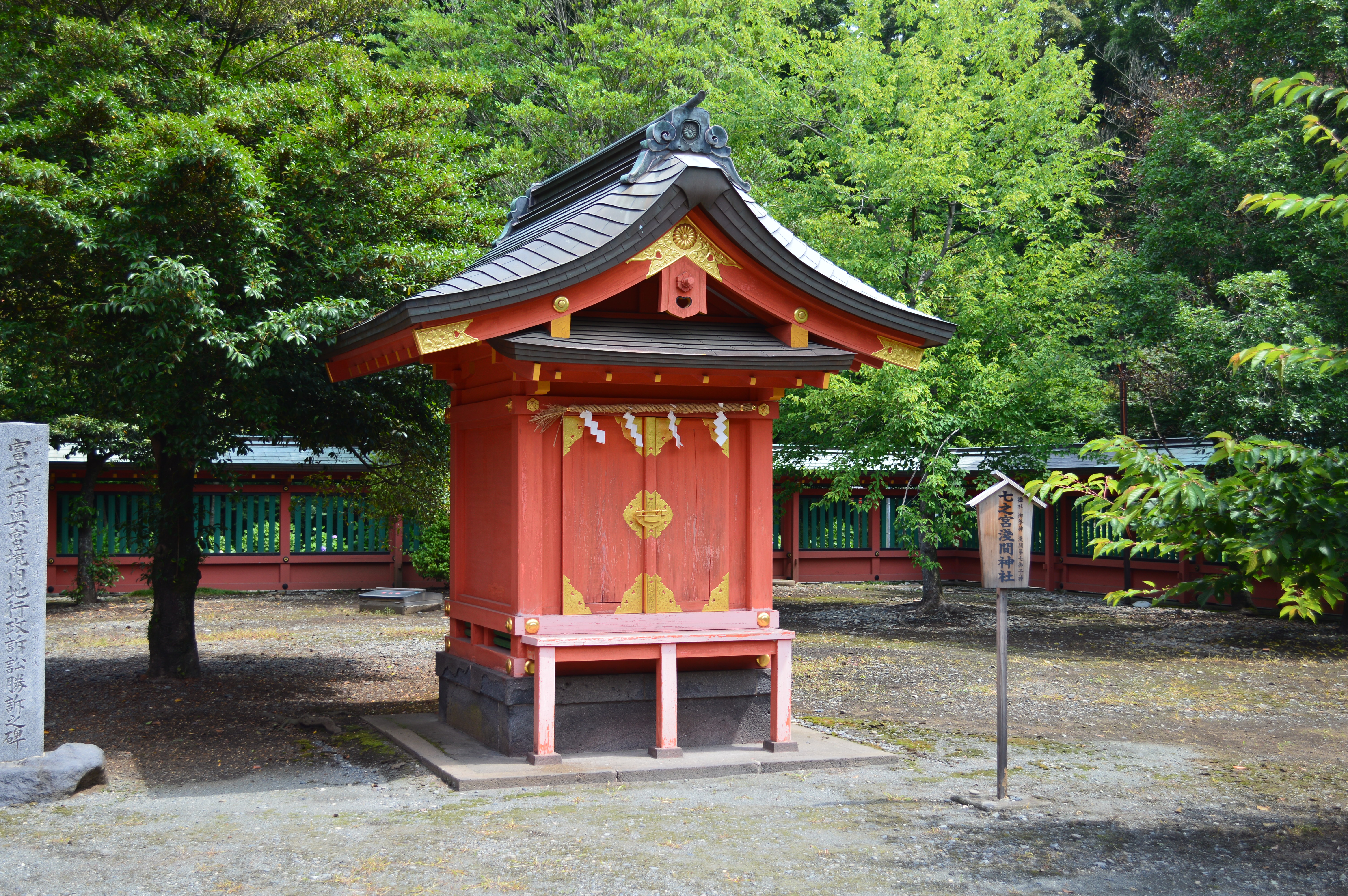 七之宮 (浅間大社境内社)